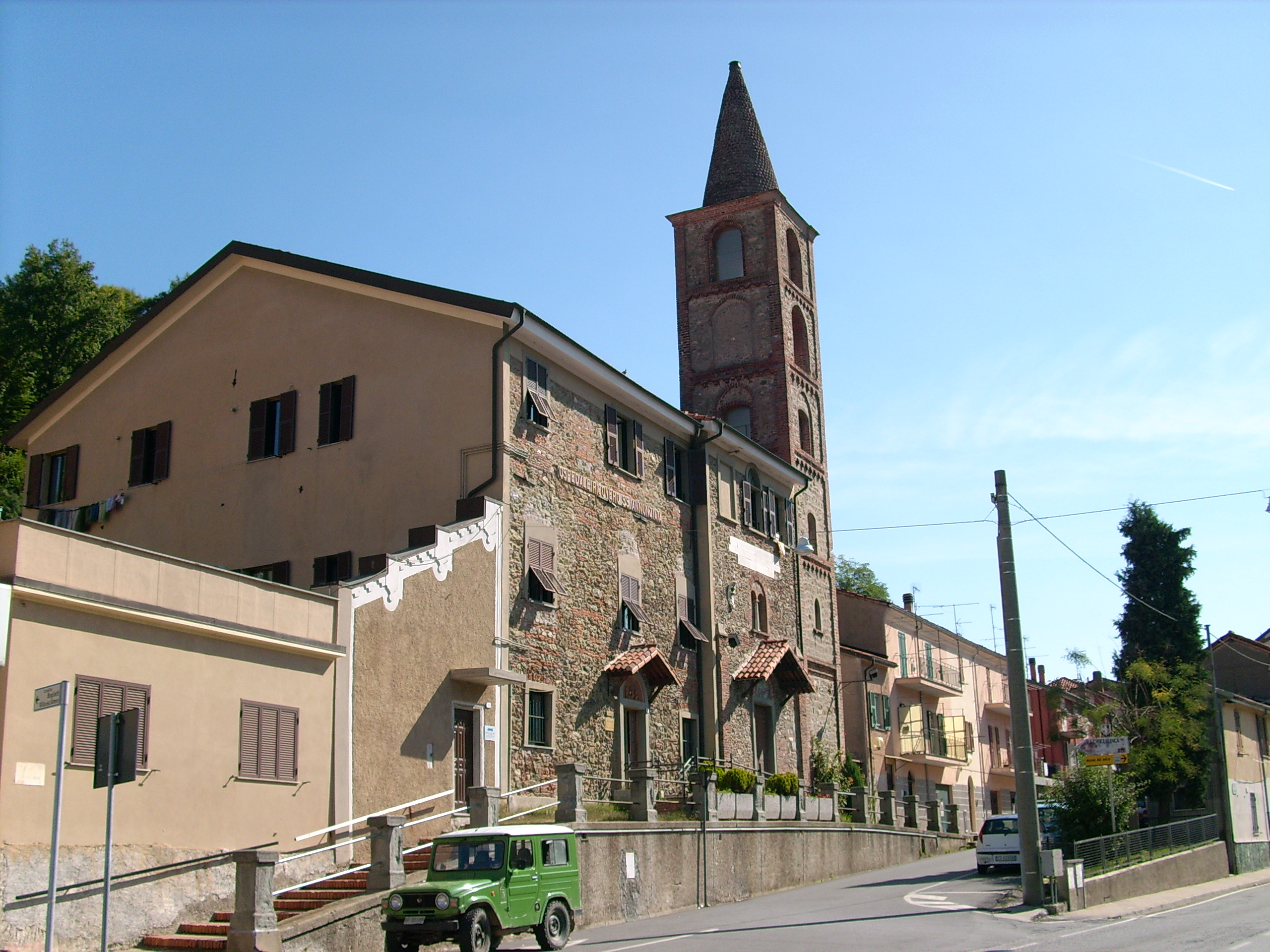 Chiesa della Santissima Annunziata di Altare, Liguria, Italia